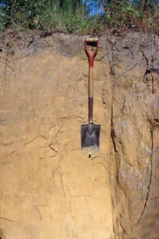 Aeric Quartzipsamment, Florida. "Figure 11. - Profile of Lakeland sand. The shovel is 42 inches long."